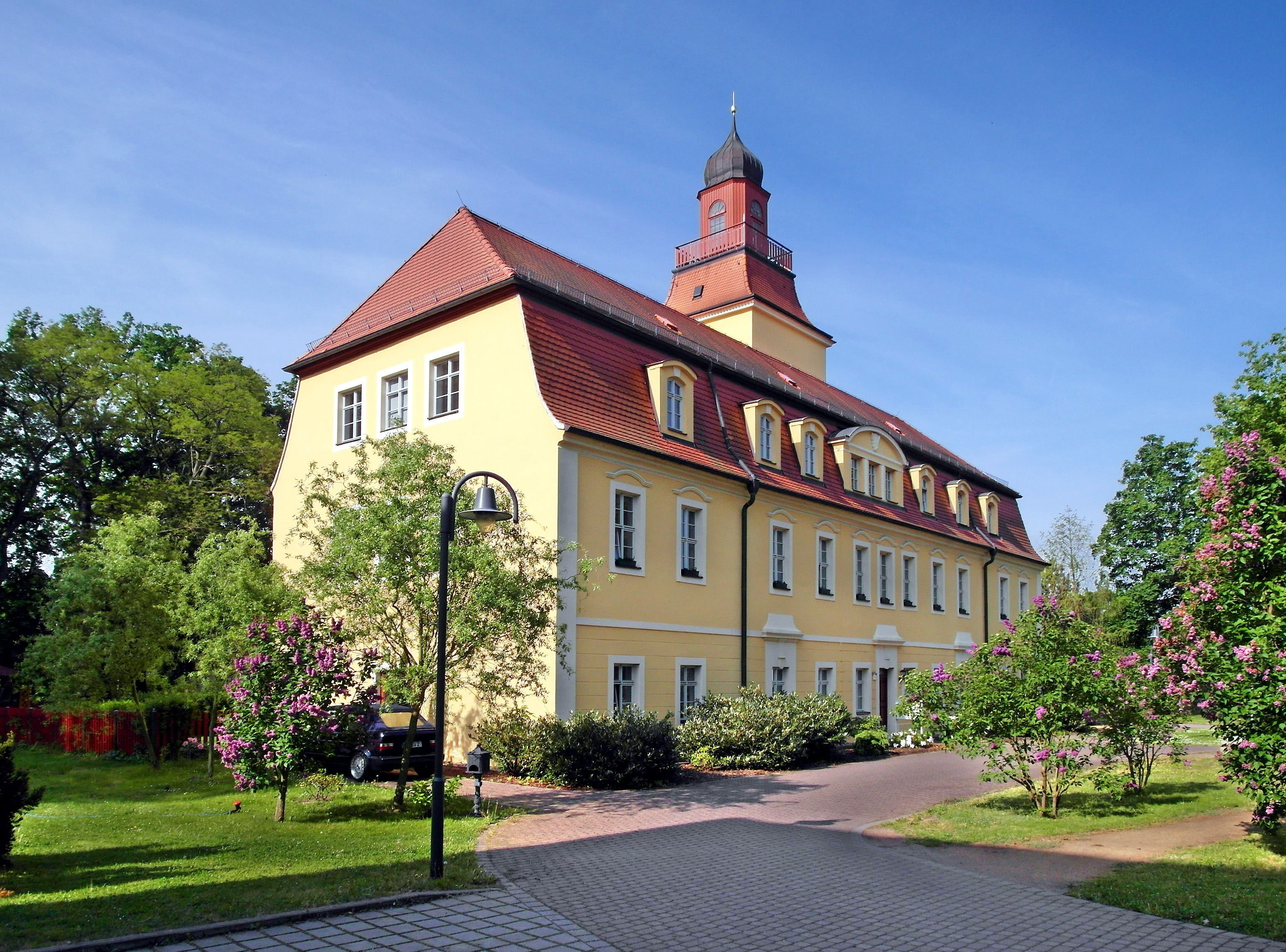 19.05.2016 01612 Glaubitz: Schloß Glaubitz, Zum Heim 3. Hofseite. Urspr. eine im 13. Jh. angelegten Wasserburg. Im Jahr 1408 ist Poppe von Köckeritz auf Glaubitz ansässig. Hans Adam von Seyffertitz ließ zwischen 1719 und 1724 die gesamte Hofbebauung erneuern. Das heutige Erscheinungsbild entstand zwischen 1907 - 1909 durch den Umbau von Theodor Bienert, dem Besitzer der Dresdner Bienertmühle, der d. Rittergut 1896 gekauft hatte. Der Raum der einstigen Bibliothek im Obergeschoß mit seiner sichtbaren Holzbalkendecke ist noch erhalten. In der DDR wurde d. Schloß als Heim für die Opfer des Faschismus und als Genesungsheim des FDGB genutzt. Danach gehörte es zum Kreiskrankenhaus Riesa und war zuletzt Alten- und Pflegeheim. 2004 bis 2005 ist das Herrenhaus saniert worden. Heute befindet sich hier die Geschäftsstelle der Volkssolidarität u. Wohnungen. [SAM5994.JPG]20160519210DR.JPG(c)Blobelt